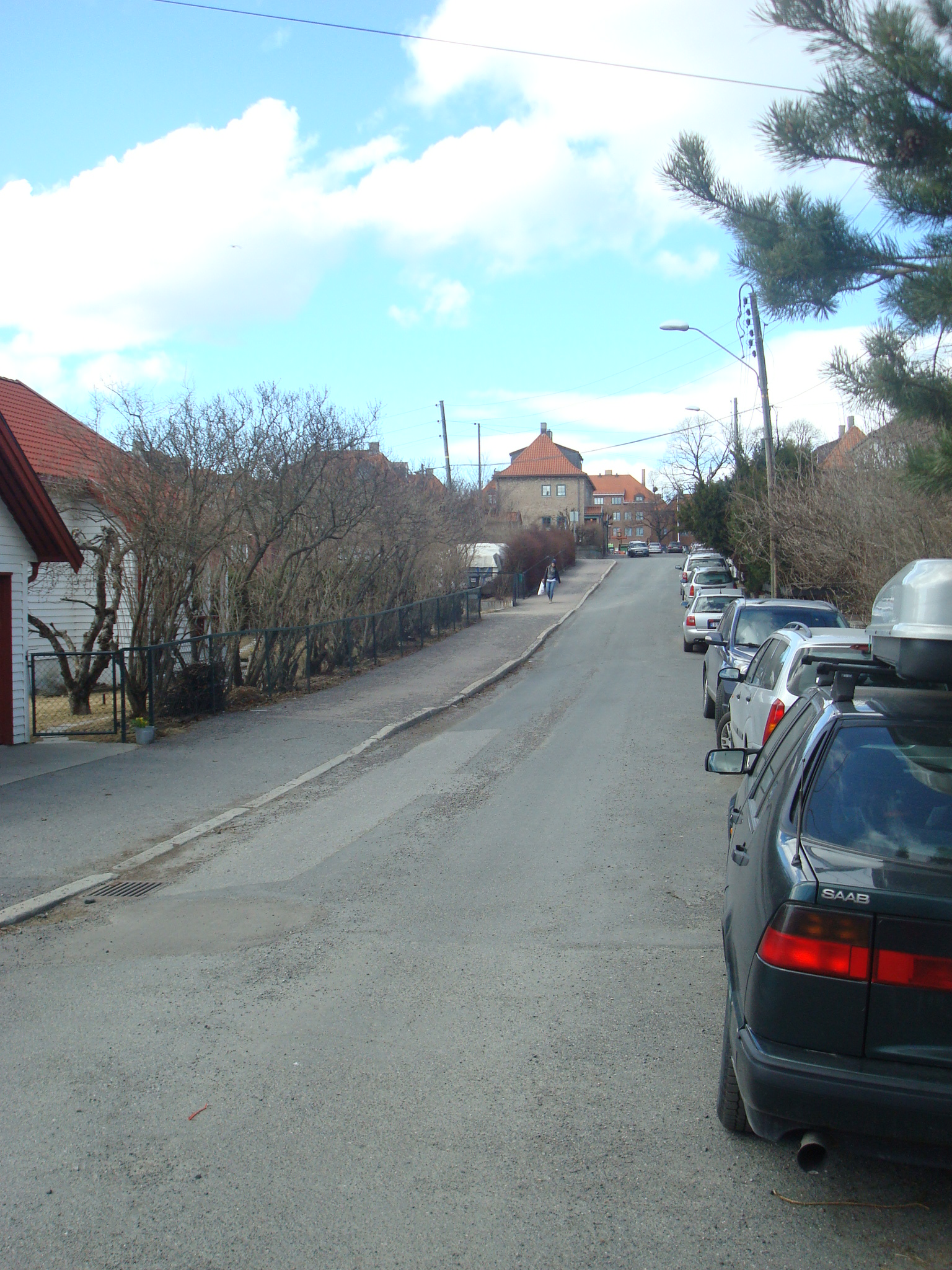 Njåls vei i Oslo (2013). Sett oppover mot Kaare Røddes Plass over Hovinveien.